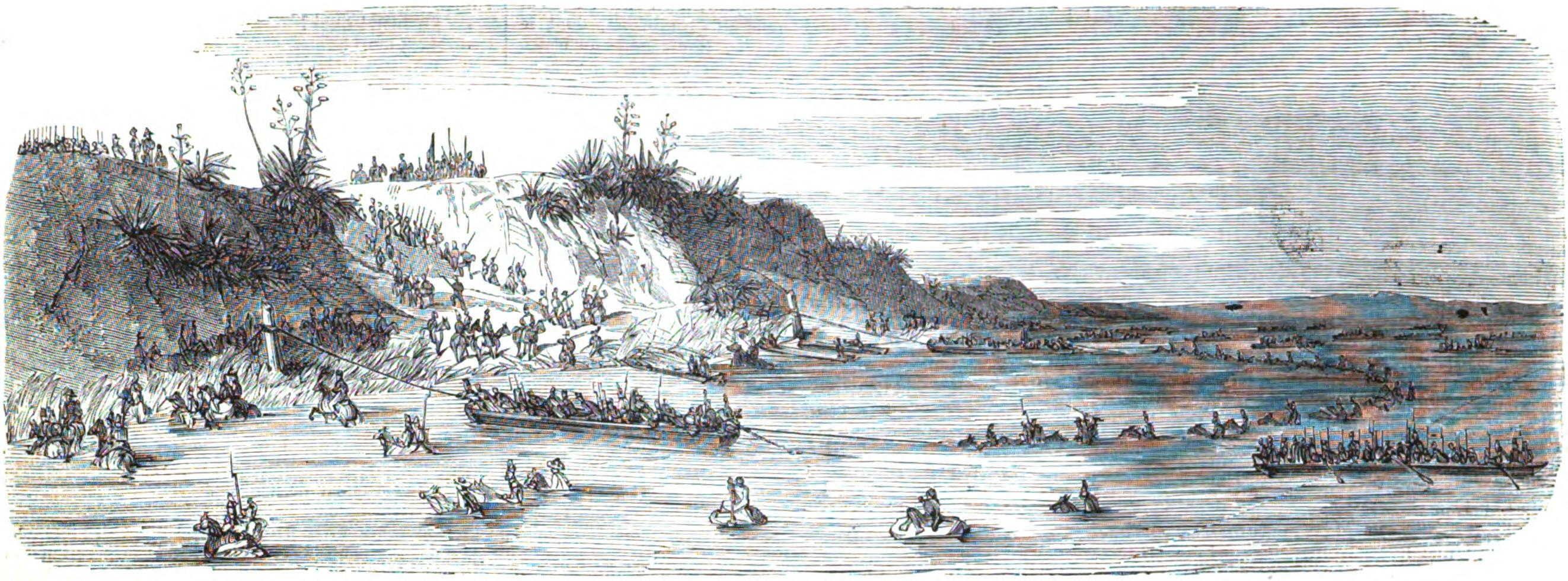 Passage du Paraná par l'armée d'Urquiza.